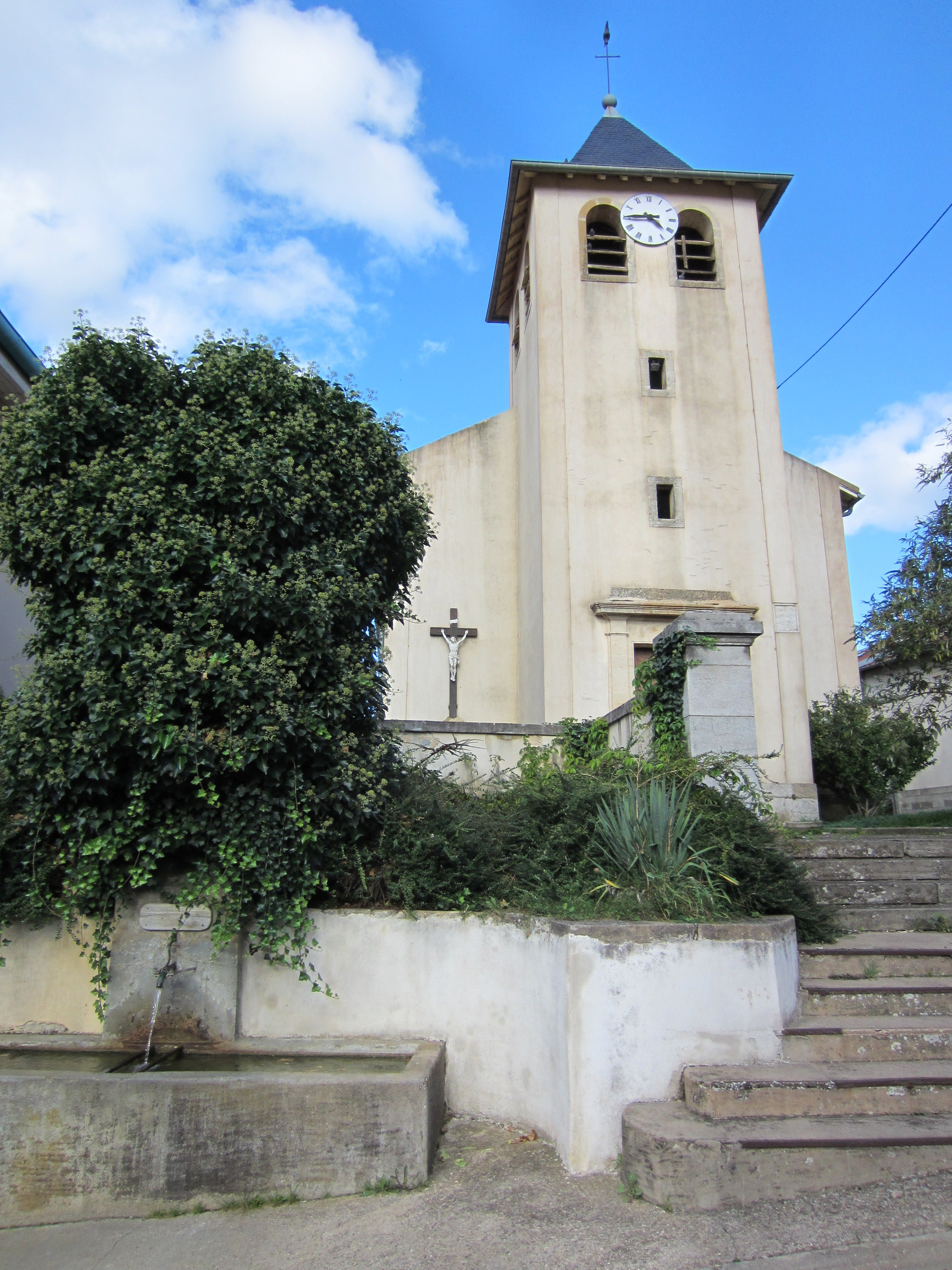 Description eglise Villecey Mad eglise Villecey Mad